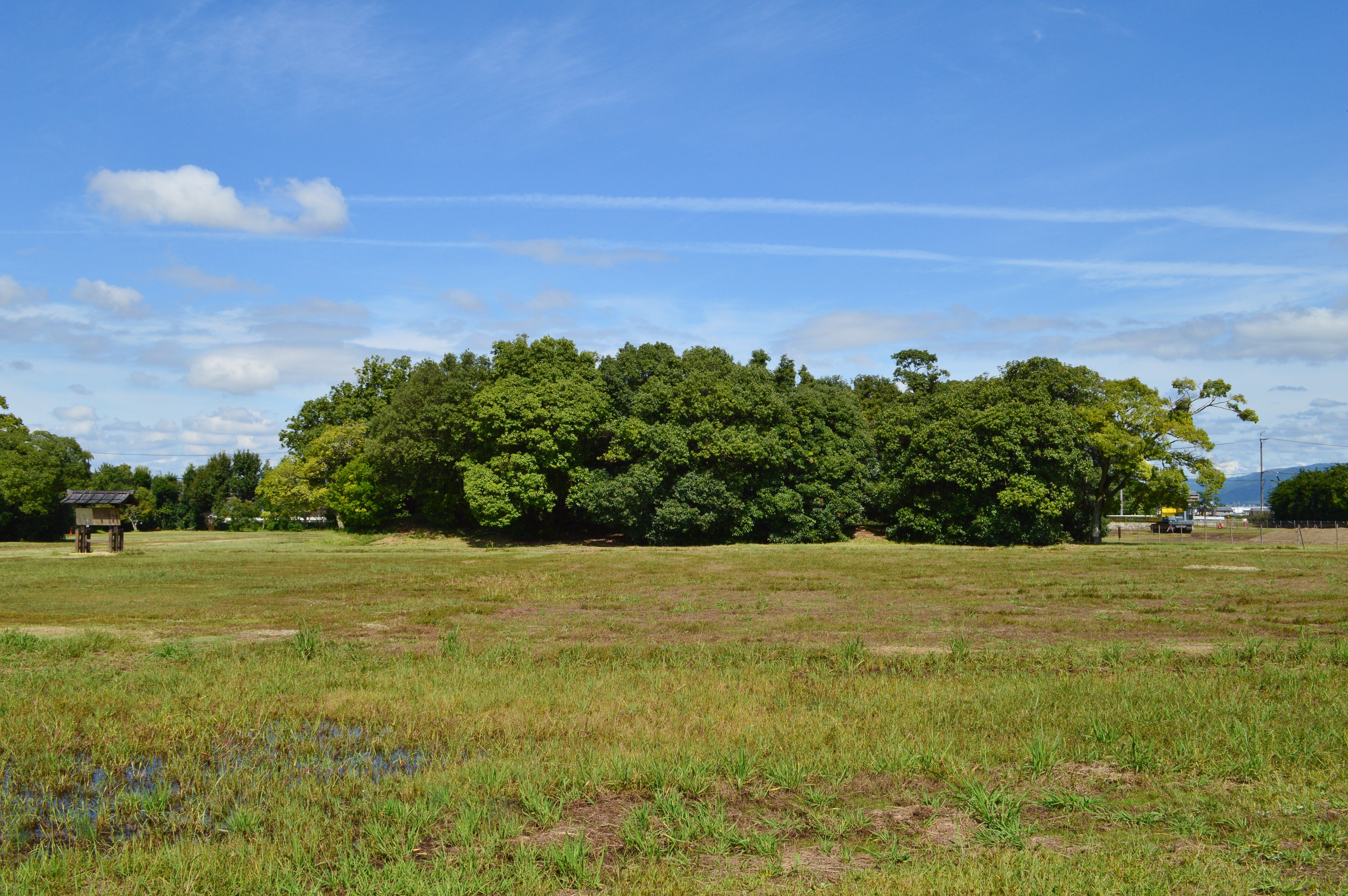 藤原宮跡 大極殿